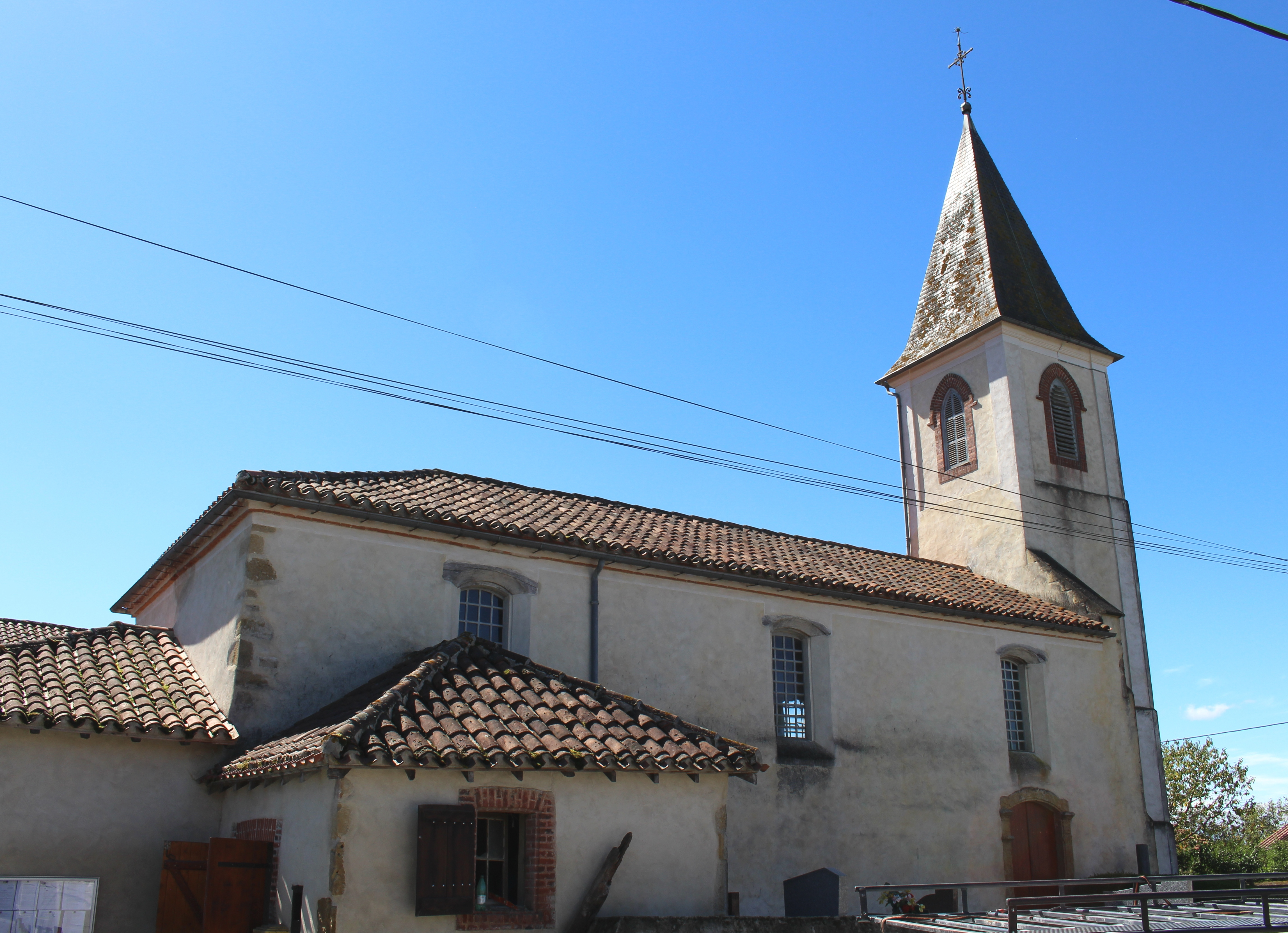 Église de la Nativité-de-la-Sainte-Vierge d'Ansost (Hautes-Pyrénées)